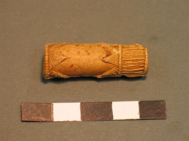 Krítarpípa frá 17. öld. Fannst í fornleifauppgrefti á Strákatanga.